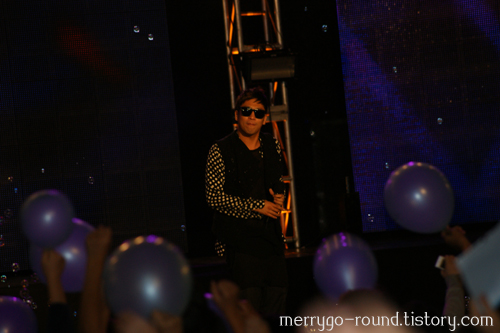 090831 원주 한마음콘서트